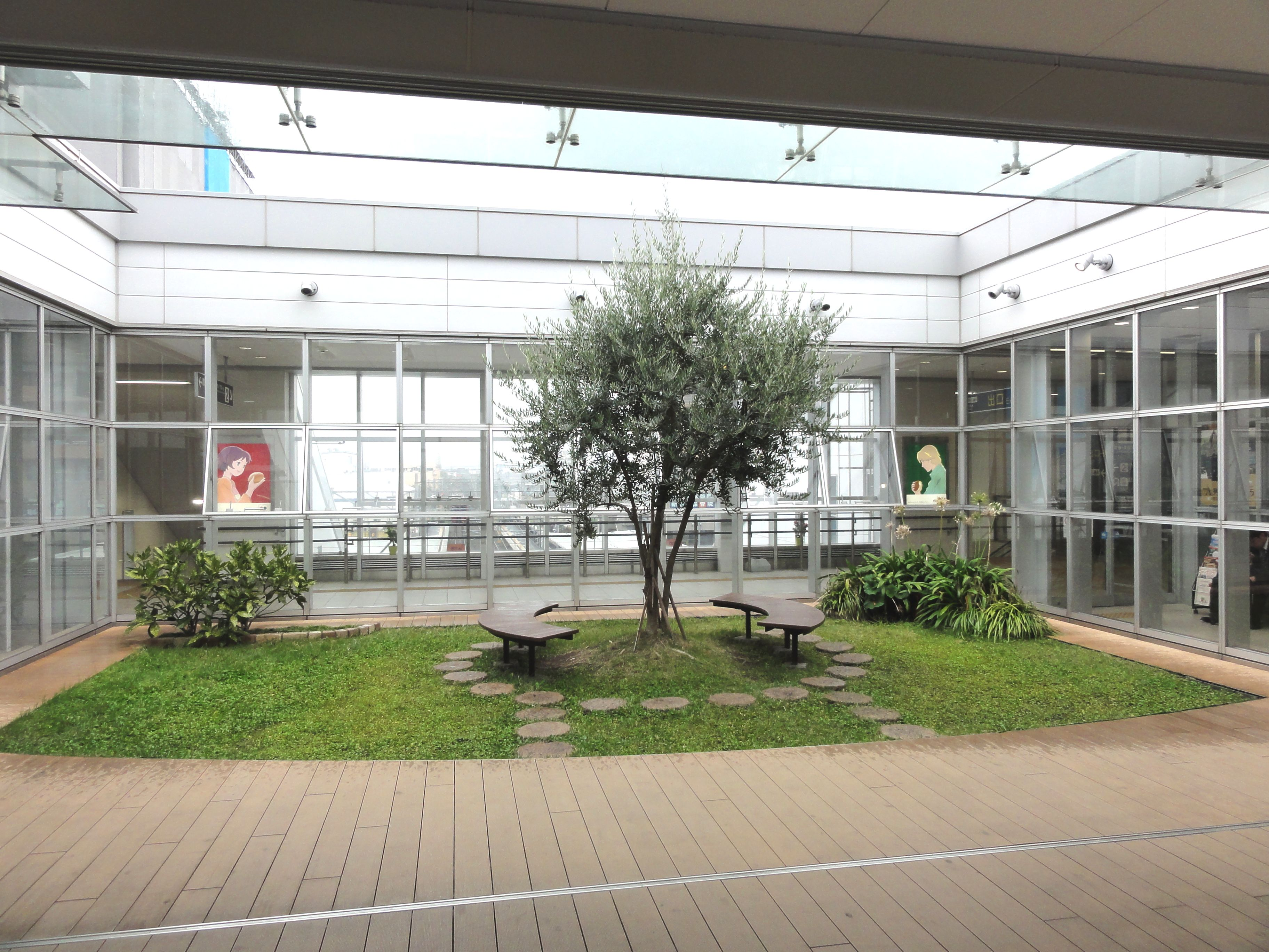 新宮中央駅 駅内広場